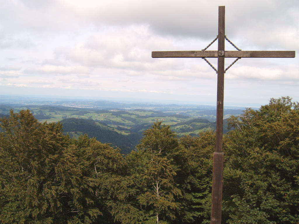 Gipfelkreuz auf dem Schnebelhorn